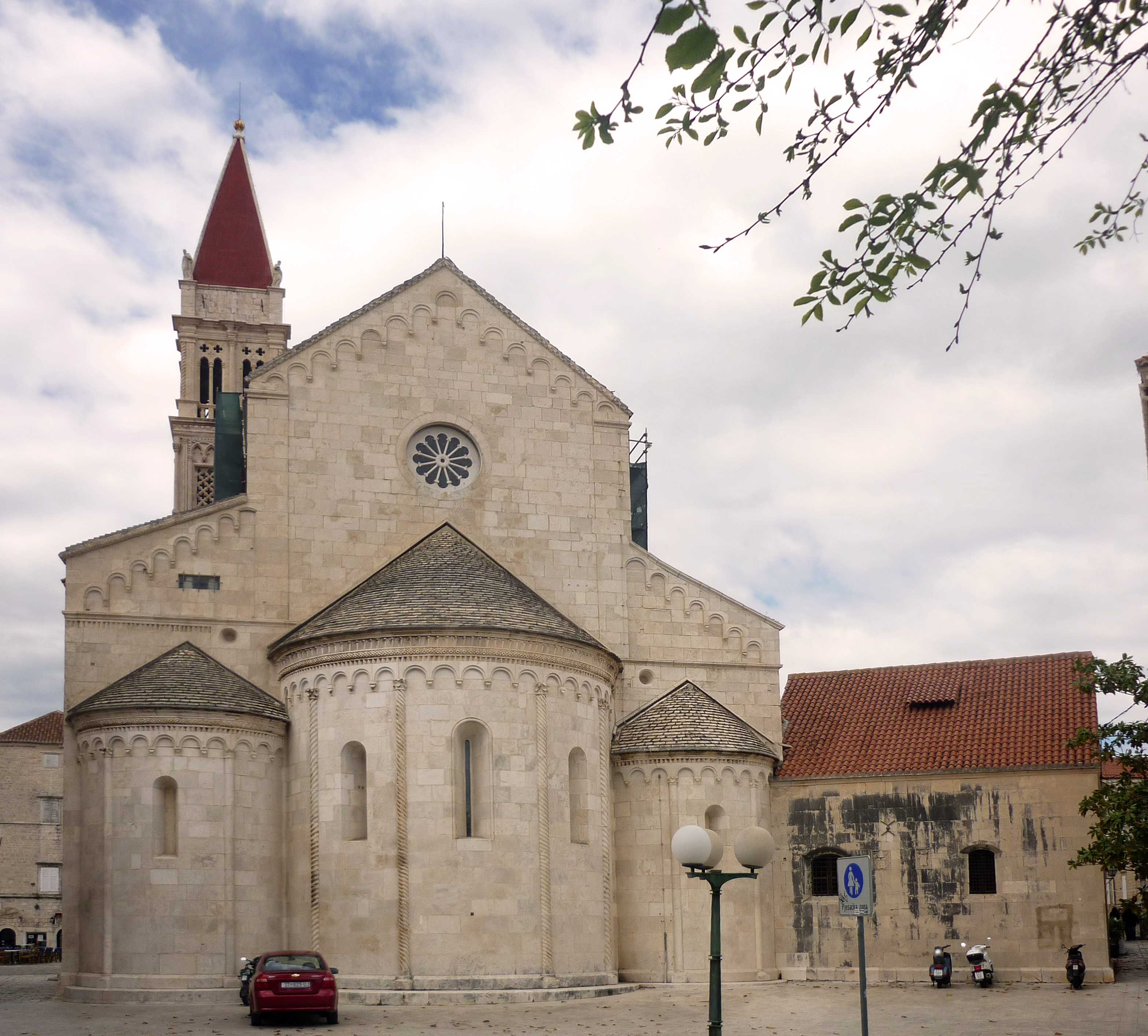 Kathedrale St. Laurentius in Trogir (Ostseite mit Apsiden)